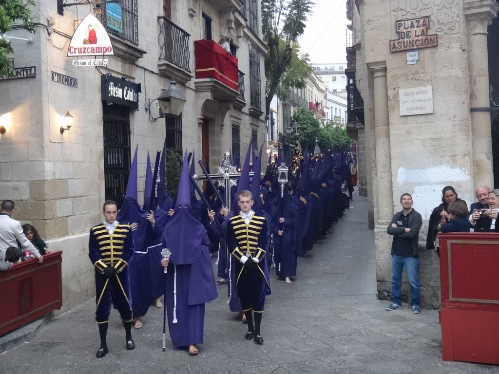 Semana Santa de Jerez (Andalucía, España)